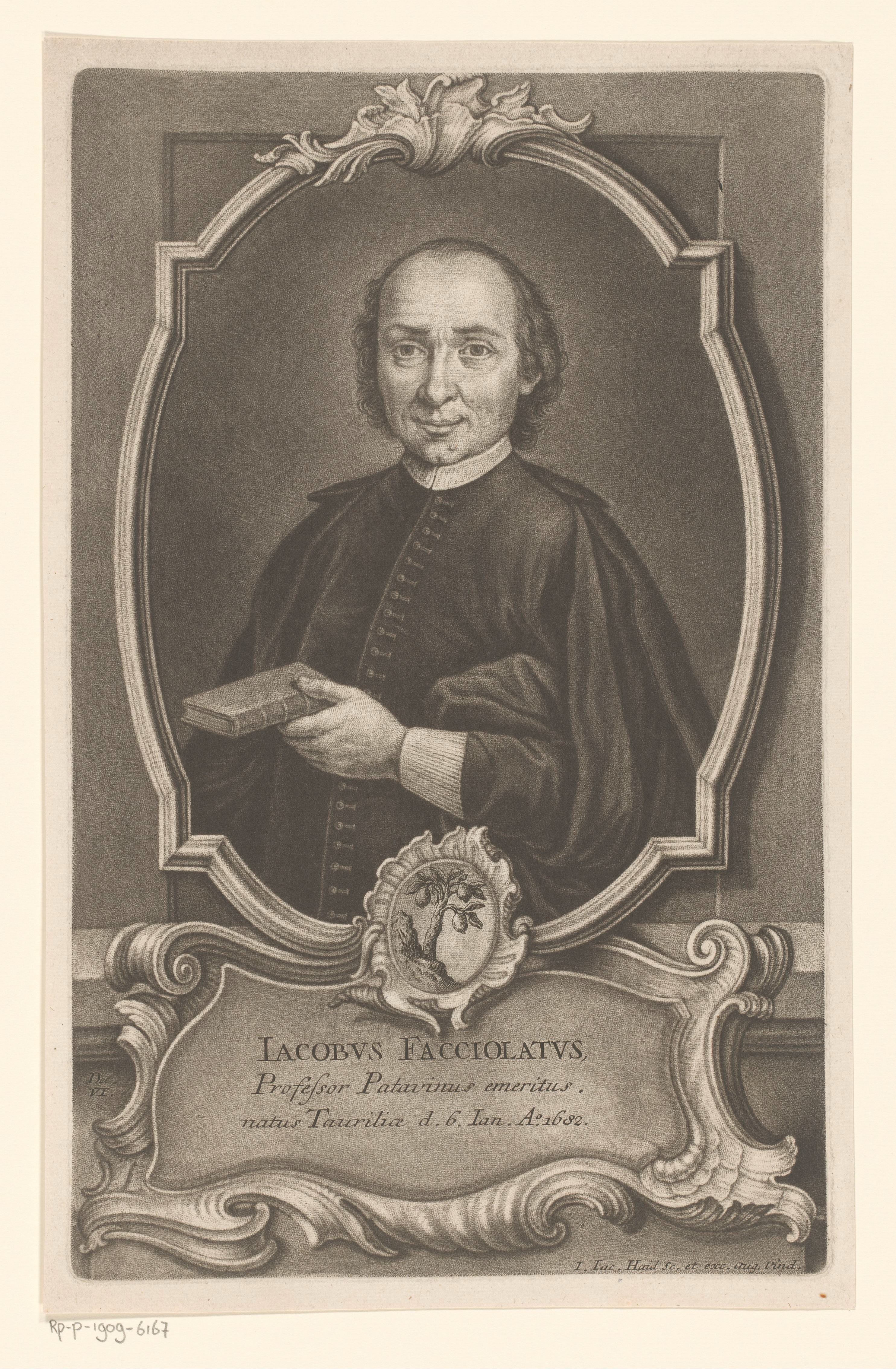 IdentificatieTitel(s): Portret van Jacopo FacciolatiObjecttype: prent Objectnummer: RP-P-1909-6167Catalogusreferentie: HAB A 6295Opschriften / Merken: verzamelaarsmerk, verso, gestempeld: Lugt 2228VervaardigingVervaardiger: prentmaker: Johann Jacob Haid (vermeld op object)uitgever: Johann Jacob Haid (vermeld op object)Plaats vervaardiging: AugsburgDatering: 1747Materiaal: papier Techniek: mezzotint / etsenAfmetingen: plaatrand: h 318 mm × b 200 mmToelichtingPrent gebruikt voor: Brucker, Jacob. Bildersal heutiges Tages lebender und durch Gelahrheit berühmter Schrifftsteller. Augsburg: Johann Jacob Haid, 1747.OnderwerpWat: historical personsrocaille ornamentbooktrees: lemon-treeWie: Jacopo FacciolatiVerwerving en rechtenVerwerving: aankoop 1905Copyright: Publiek domein